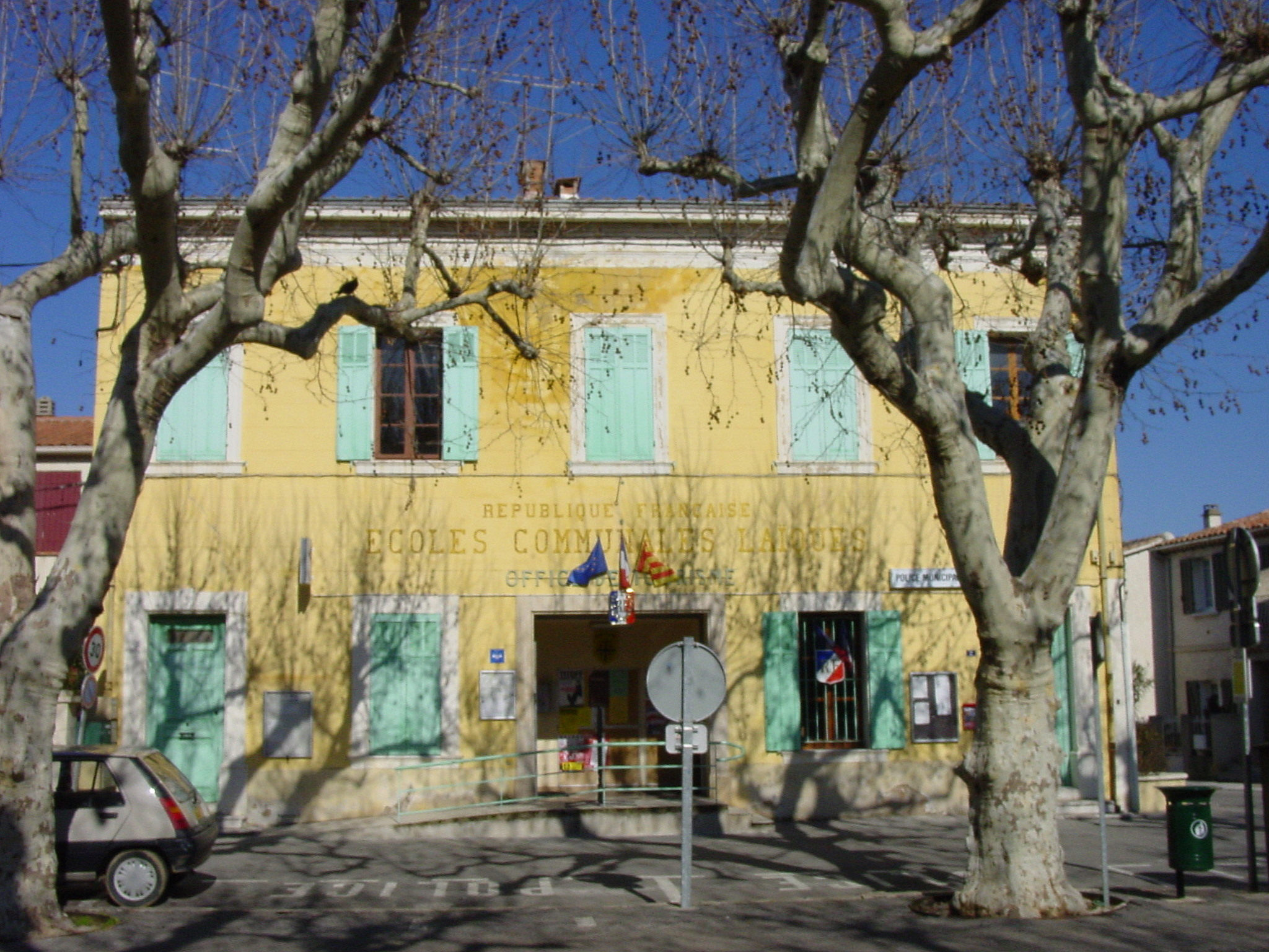 Office du Tourisme de Nans-les-Pins, ancienne école primaire